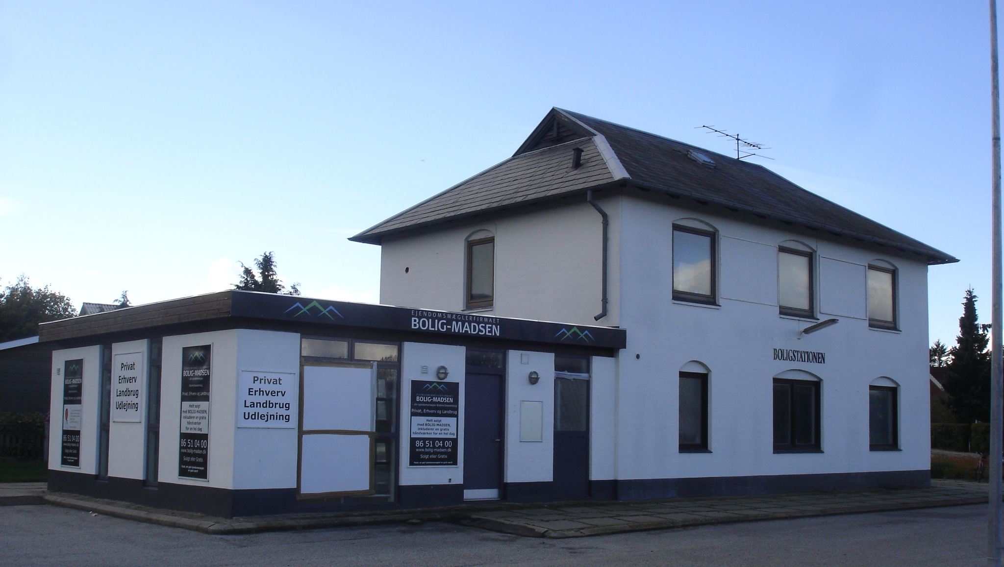 Østbirk Station fra sporsiden